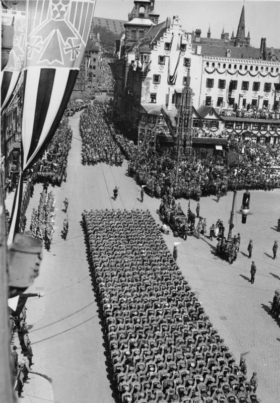 Nürnberg, Reichsparteitag der NSDAP Zentralbild Im faschistischen Deutschland. 6. Reichsparteitag der NSDAP vom 4. -10.9.1934 in Nürnberg. "Tag der SA" UBz: den Vorbeimarsch der SA und SS Abteilungen auf dem Adolf-Hitler-Platz 34 713-34 [Leni Riefenstahl bei Filmaufnahmen]